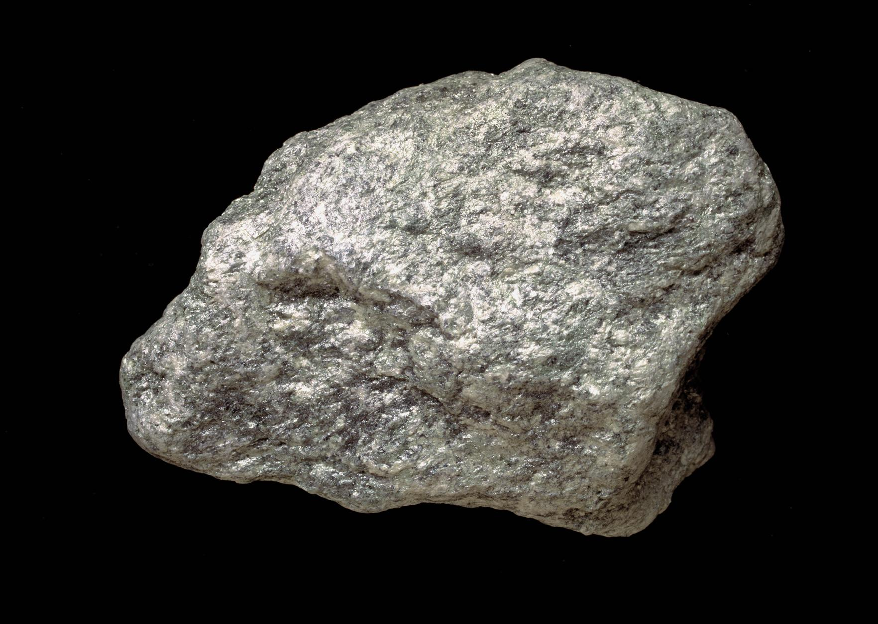 Photo: Anders Damberg Jämtlands landskapssten, täljstenen, är en omvandlad så kallad peridotit, en magmatisk intrusivbergart som huvudsakligen bestod av olivin och pyroxen, rika på järn och magnesium, som trängde upp i fjällkedjan för omkring 500 miljoner år sedan. Täljstenen är en fin, len och varm bergart som efter att den omvandlats, nu till minst tre fjärdedelar består av talk och bland annat klorit. Den är så mjuk att den kan täljas med en vanlig kniv. Men det som gör täljstenen åtråvärd är att den till skillnad från de flesta andra bergarter håller värme bra. Därför används den till värmeelement, grillstenar, kaminer och till och med till kylkuber. Täljstenen bryts sedan länge i Handöl.